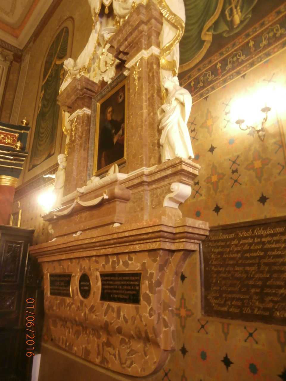 Epitafium ks. siewierskiego bp krakowskiego Kajetana Sołtyka z kościoła w Sławkowie, rokoko, stan po renowacji w roku 2010